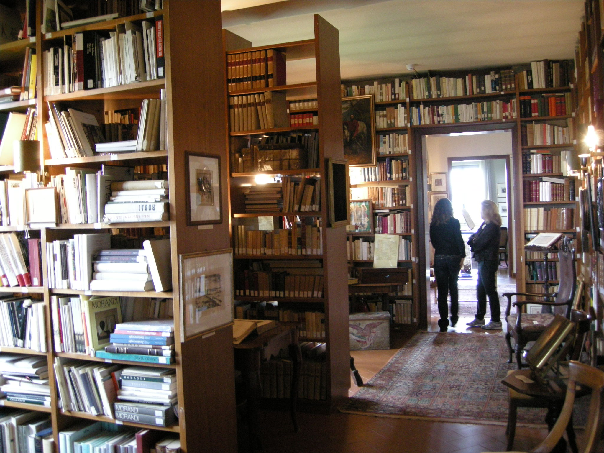 Primo piano, biblioteca